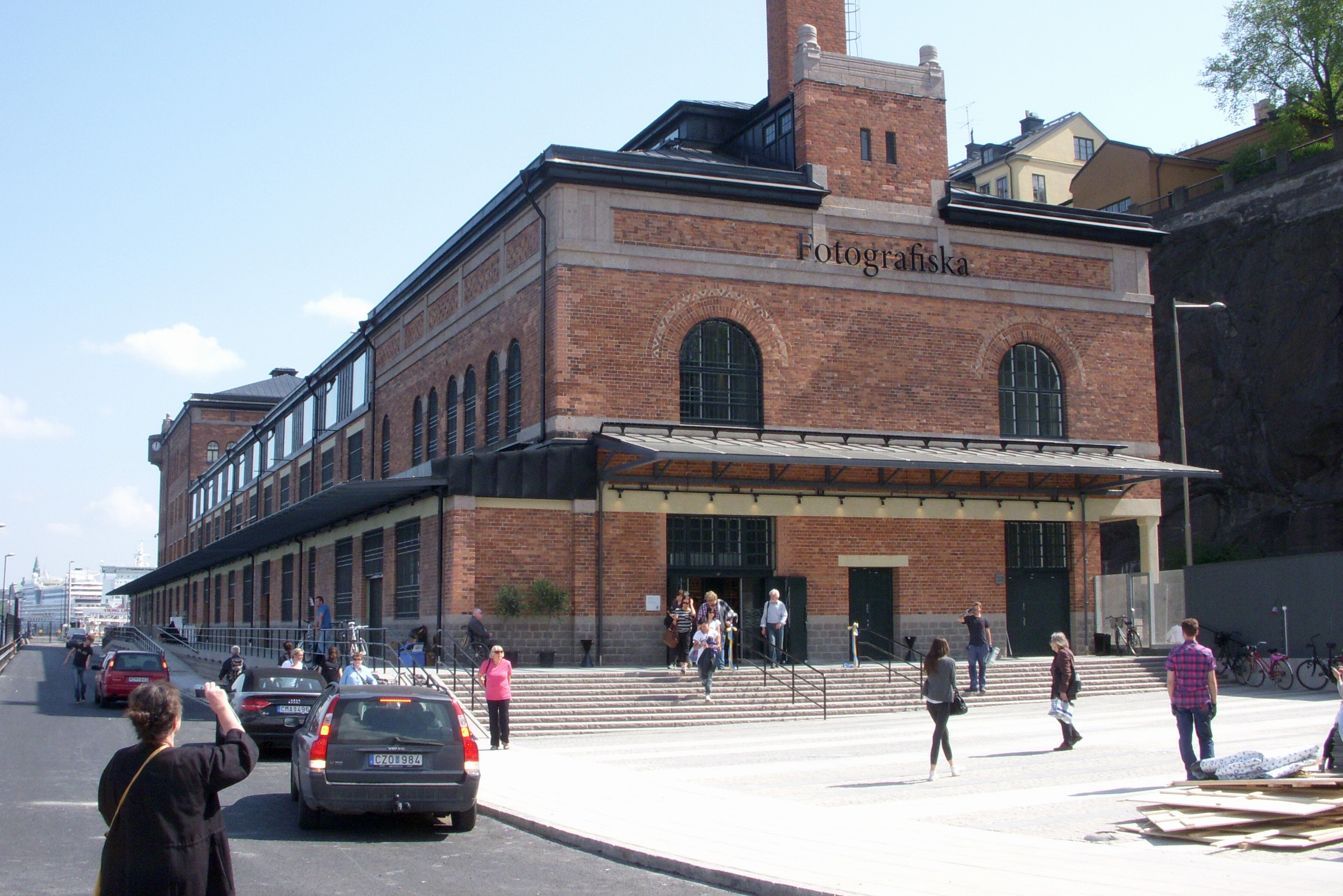 Fotografiska i Stockholm